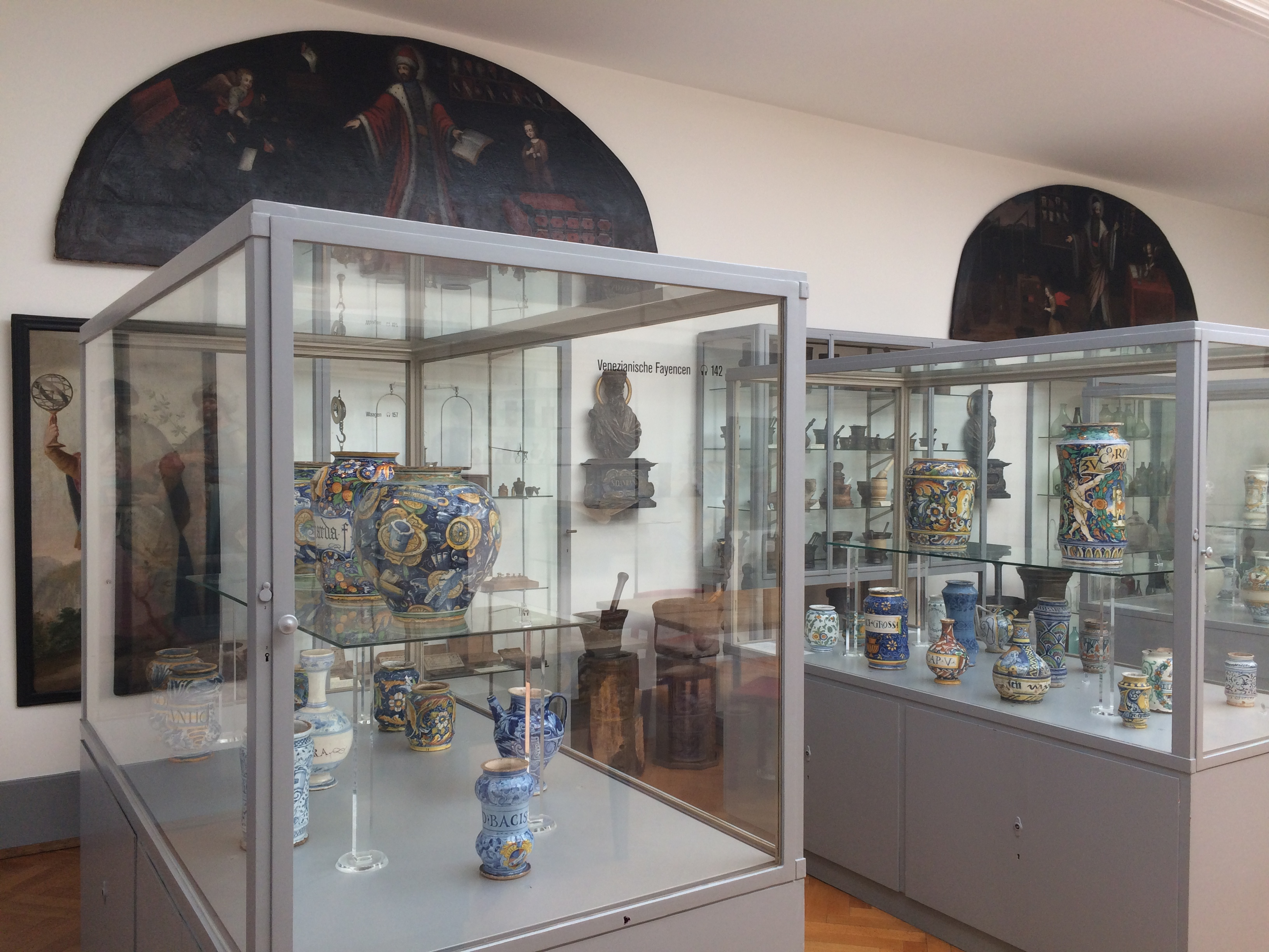 Vasensaal